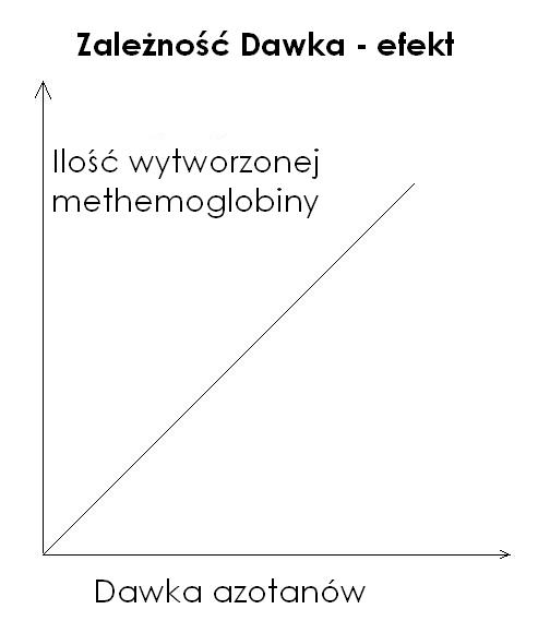 zależność ilość methemoglobiny od podanej dawki azotanów